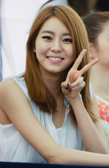 2012년 7월 1일 영등포 타임스퀘어 핫트랙스 팬사인회에서.